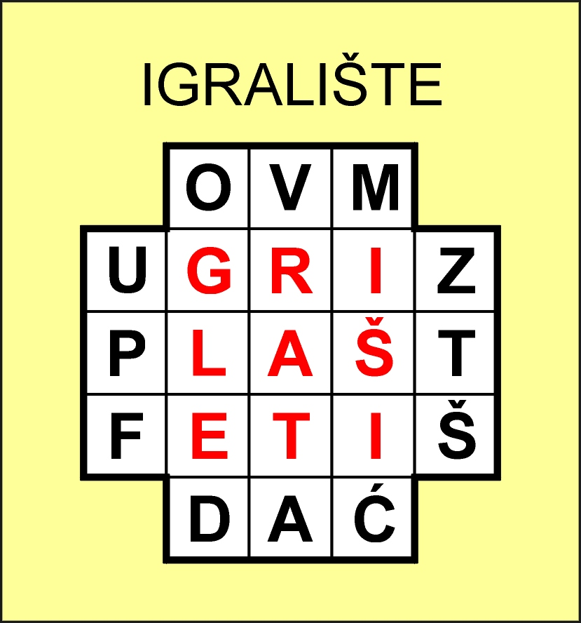 Rješenje Enigmatskog srdašca od riječi IGRALIŠTE